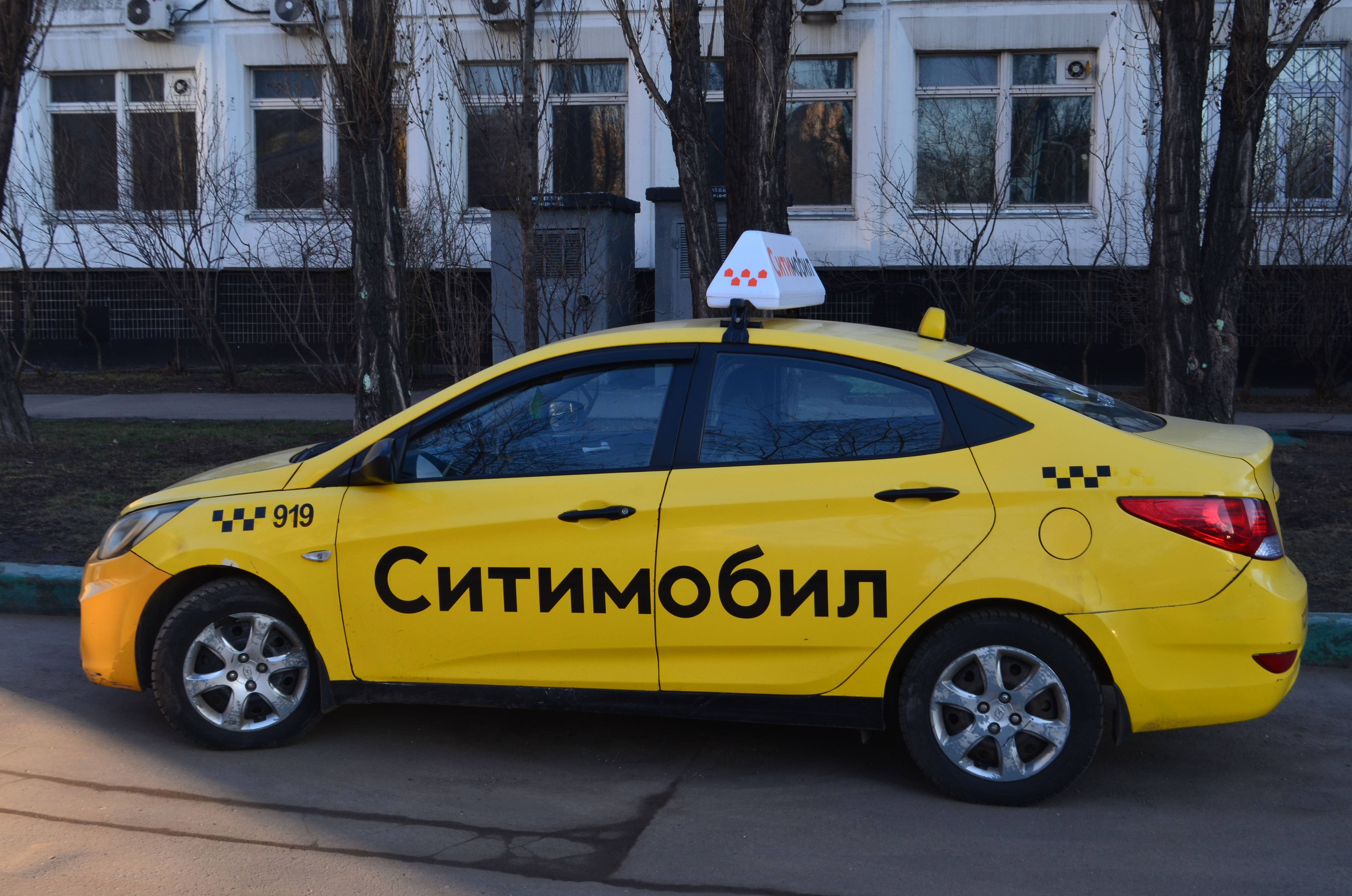 Автомобиль компании «Ситимобил» (российский сервис вызова такси) в Москве, где-то недалеко от станции метро «Кожуховская»